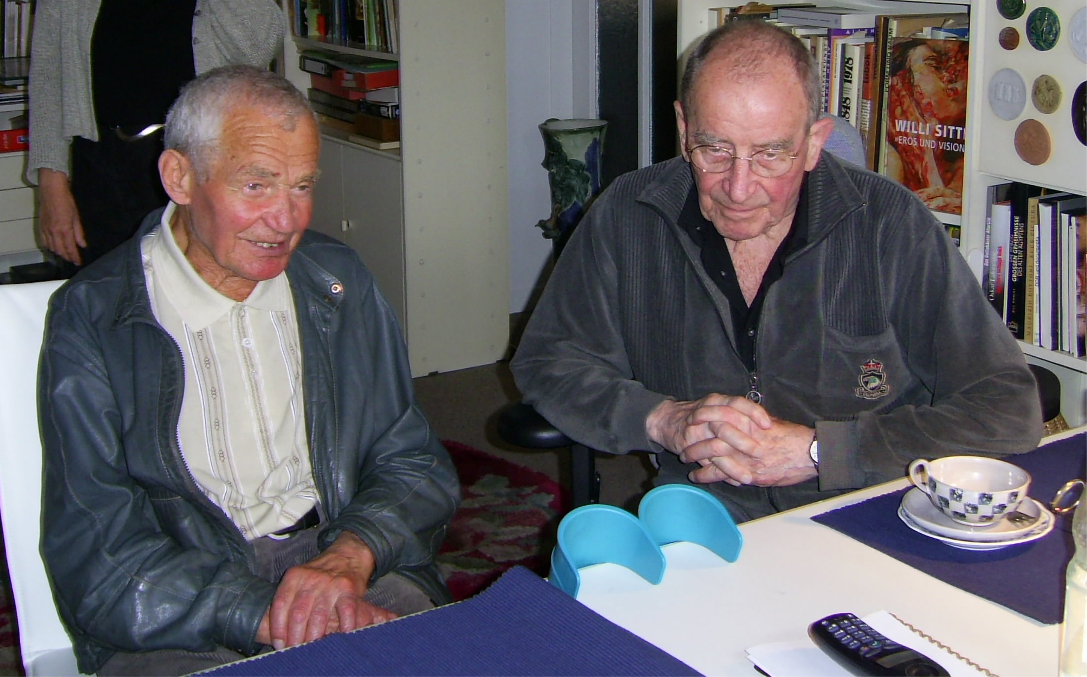 Letztes Zusammensein von Rudolf und Willi Sitte